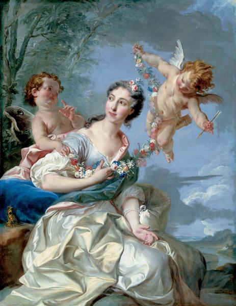 Louise Élisabeth de Bourbon (1693–1775) or, Louise-Diane d'Orleans (1716–1736)